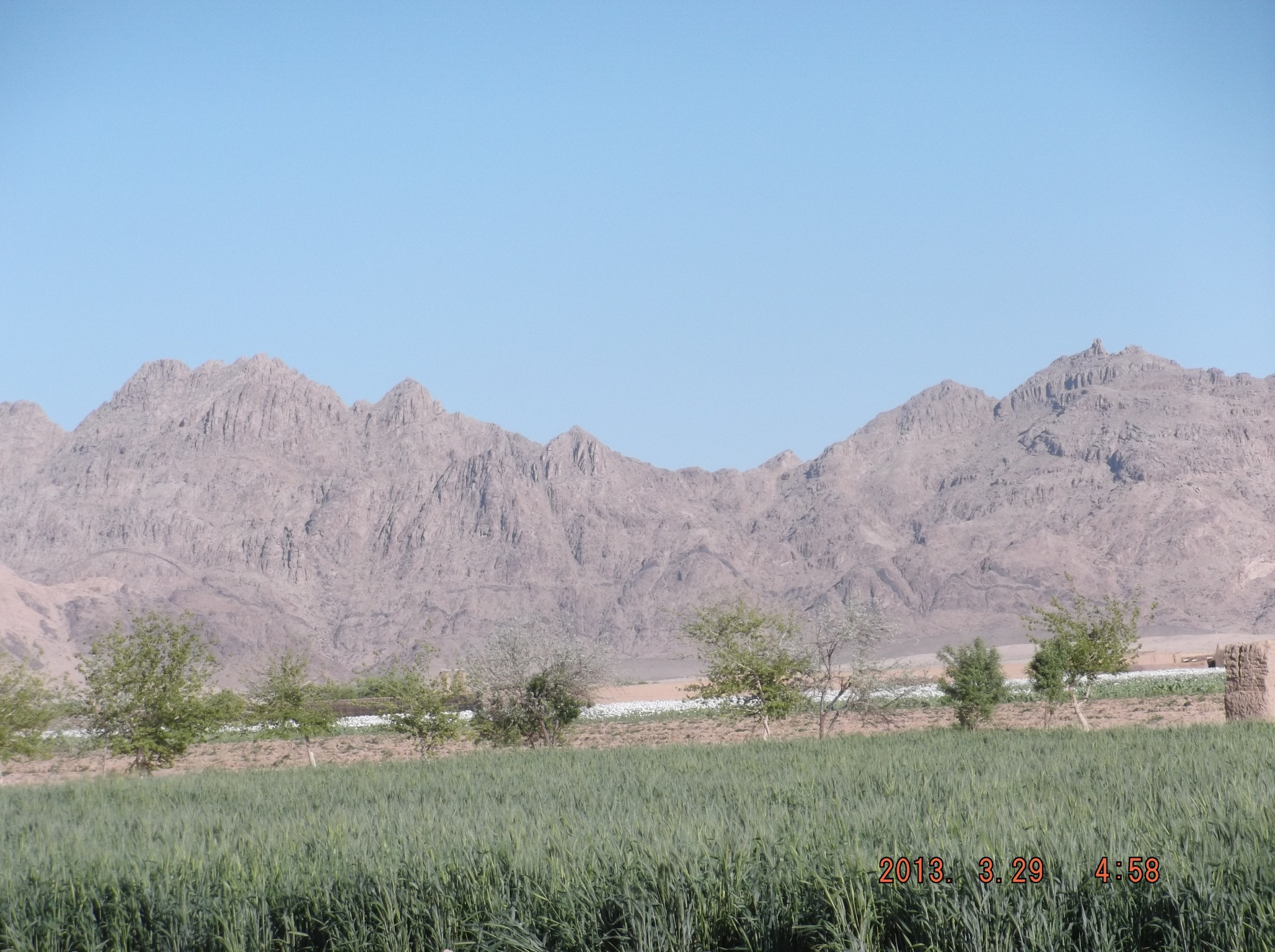 Maiwand, Afghanistan